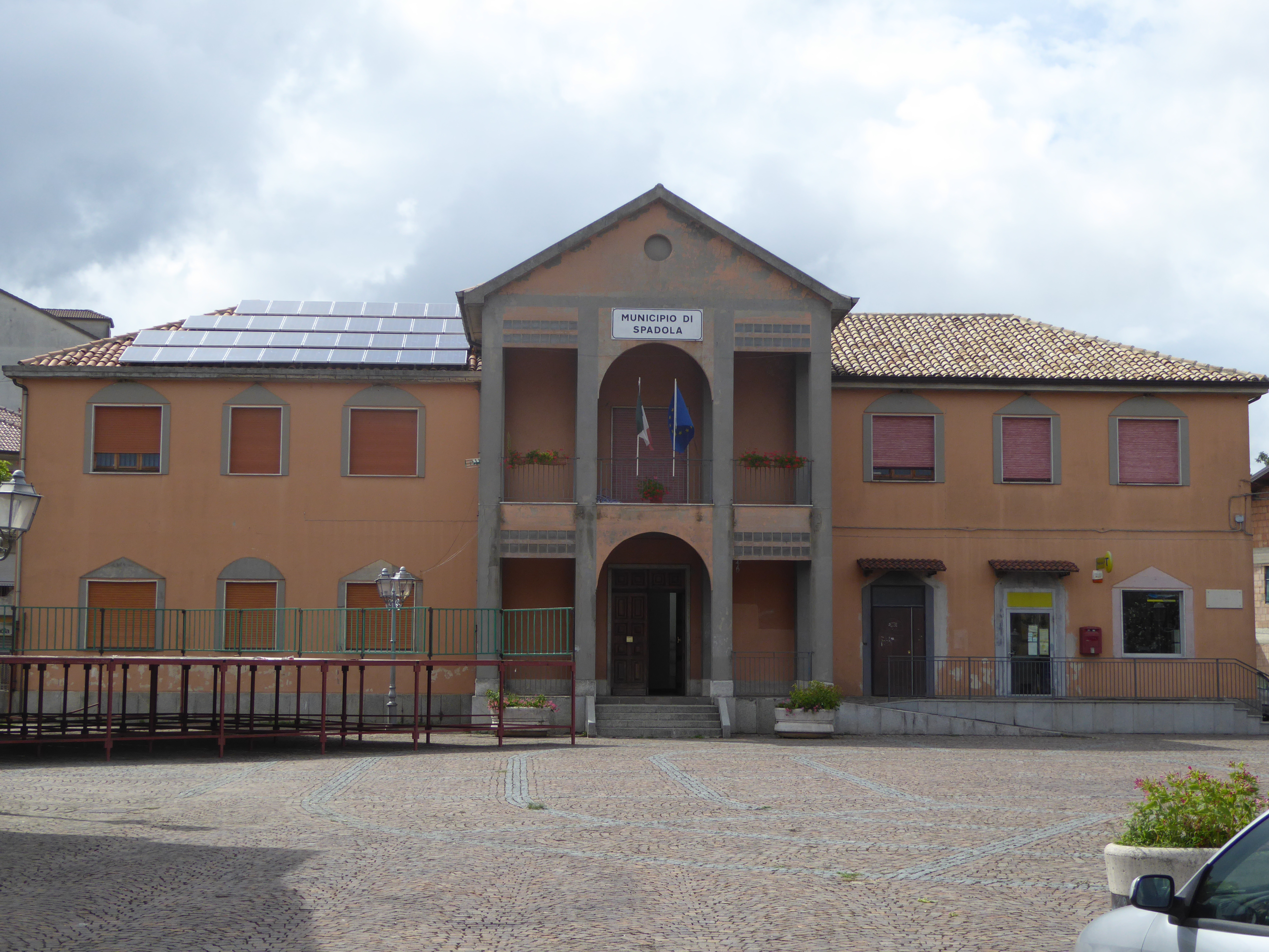 Municipio di Spadola (VV) - Italy